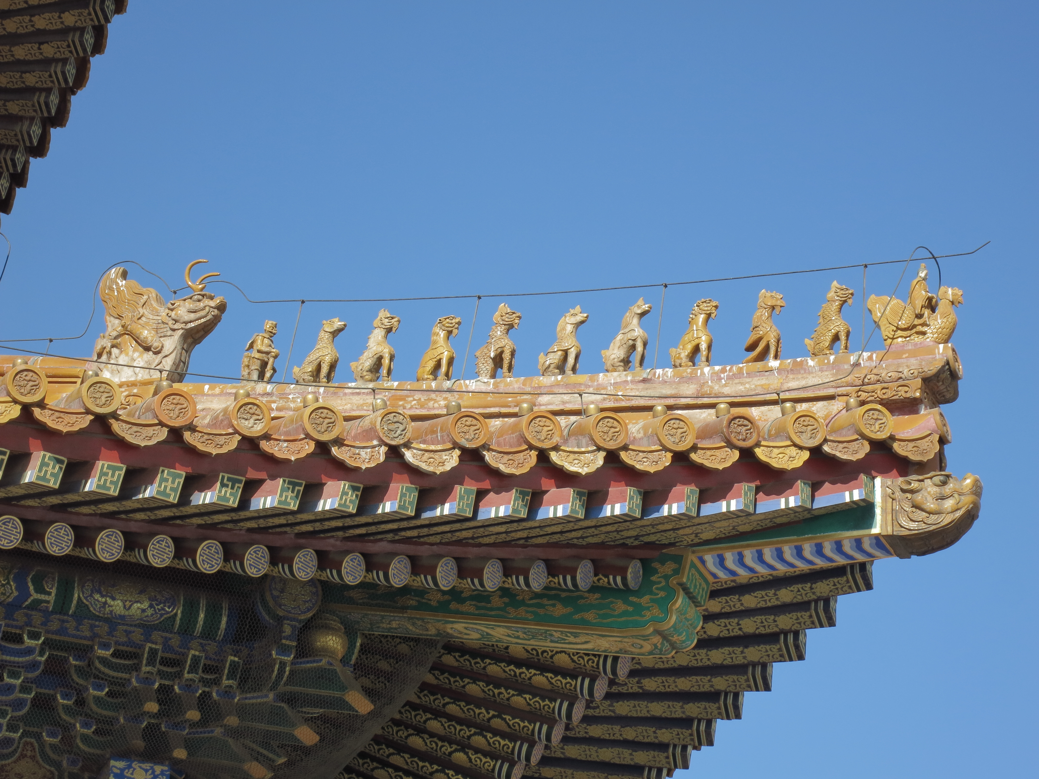 太和殿的十個脊獸